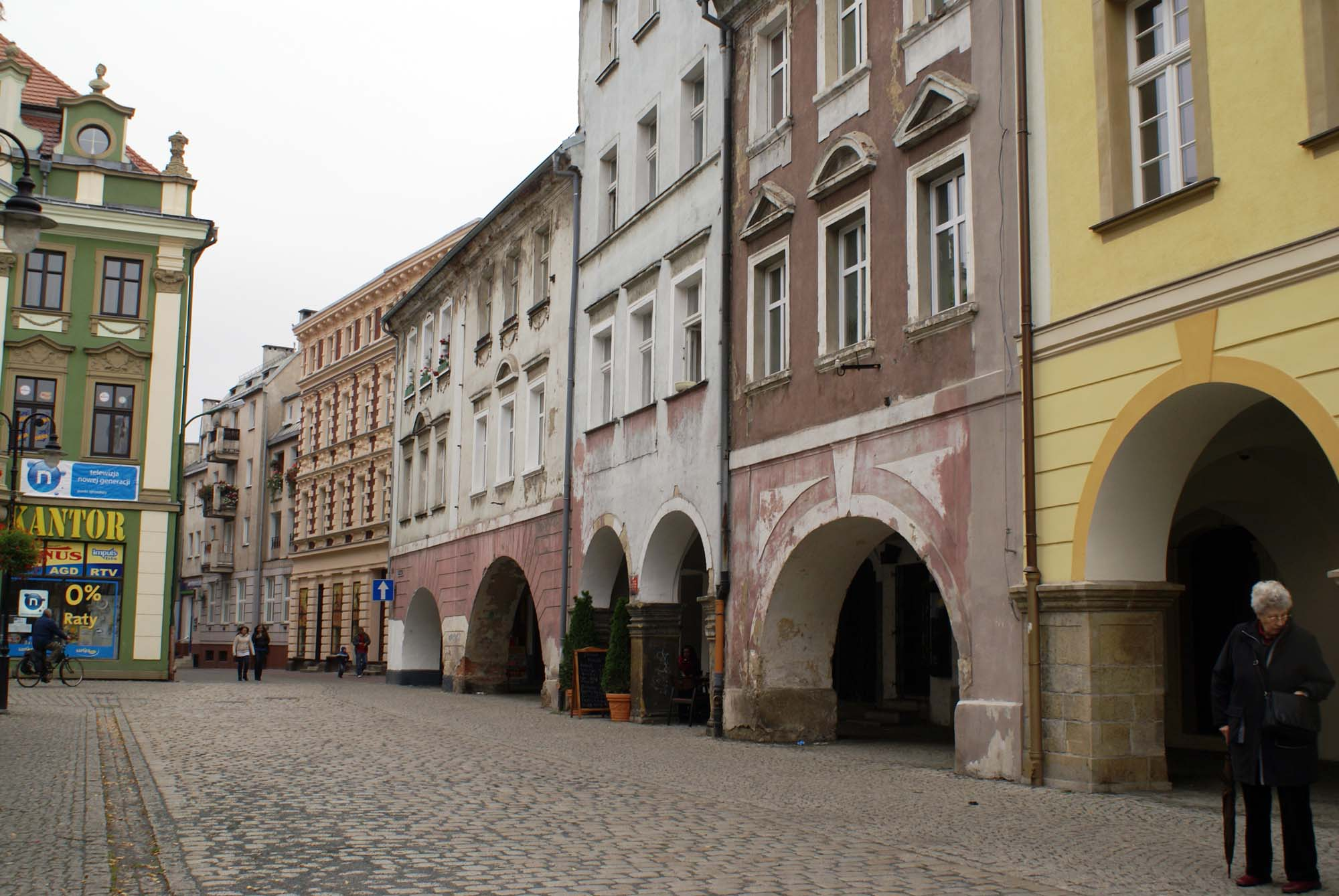 Kamienna Góra, Plac Wolności (Rynek)